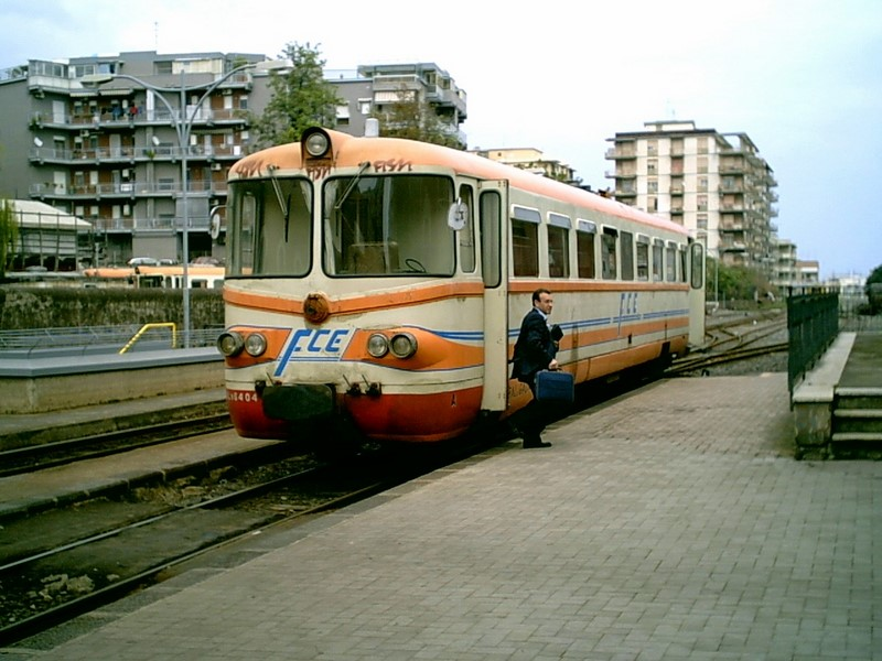 Foto di una automotrice